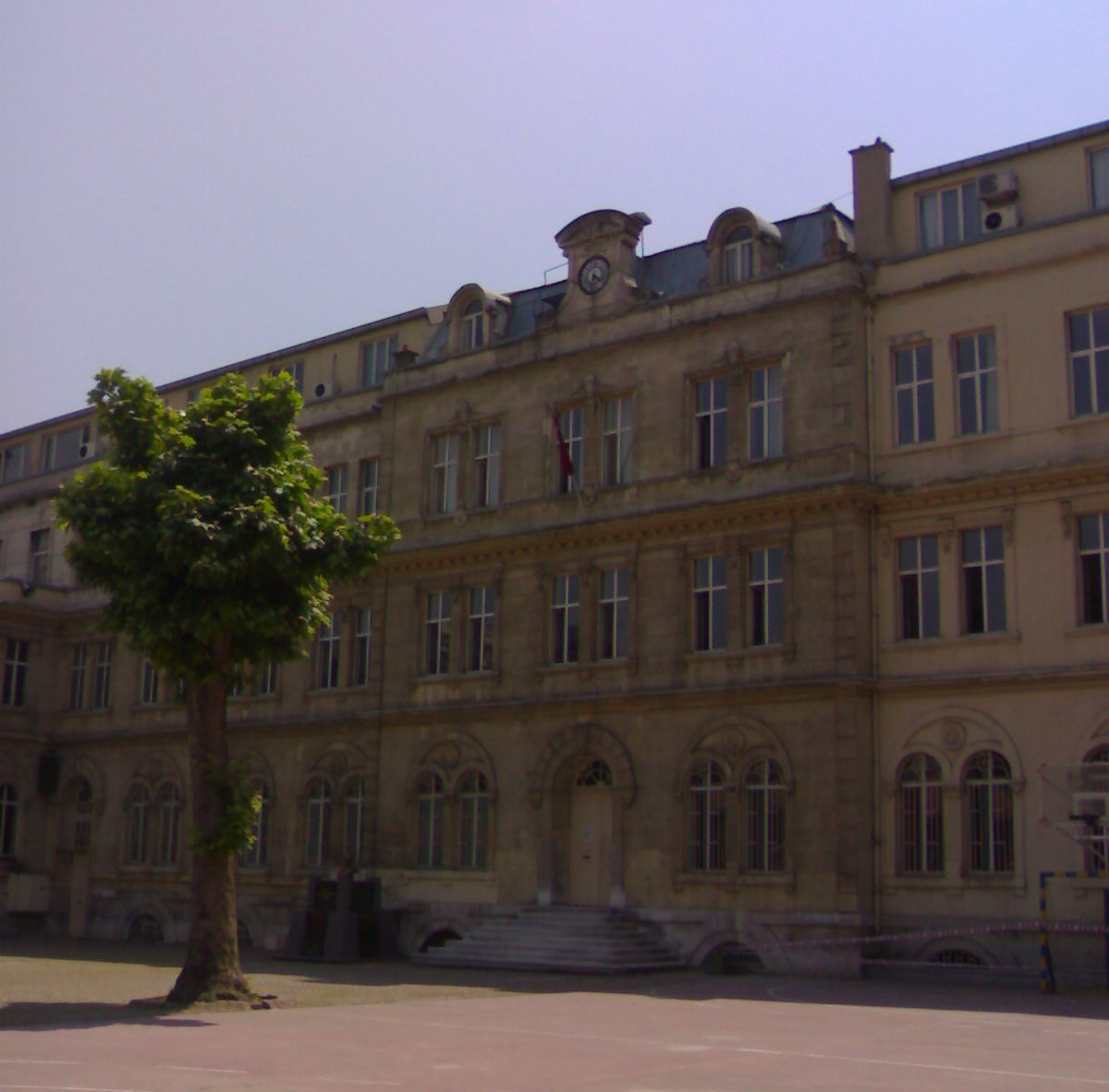 La façade du Lycée Saint Benoit à Istanbul depuis la Grande Cour